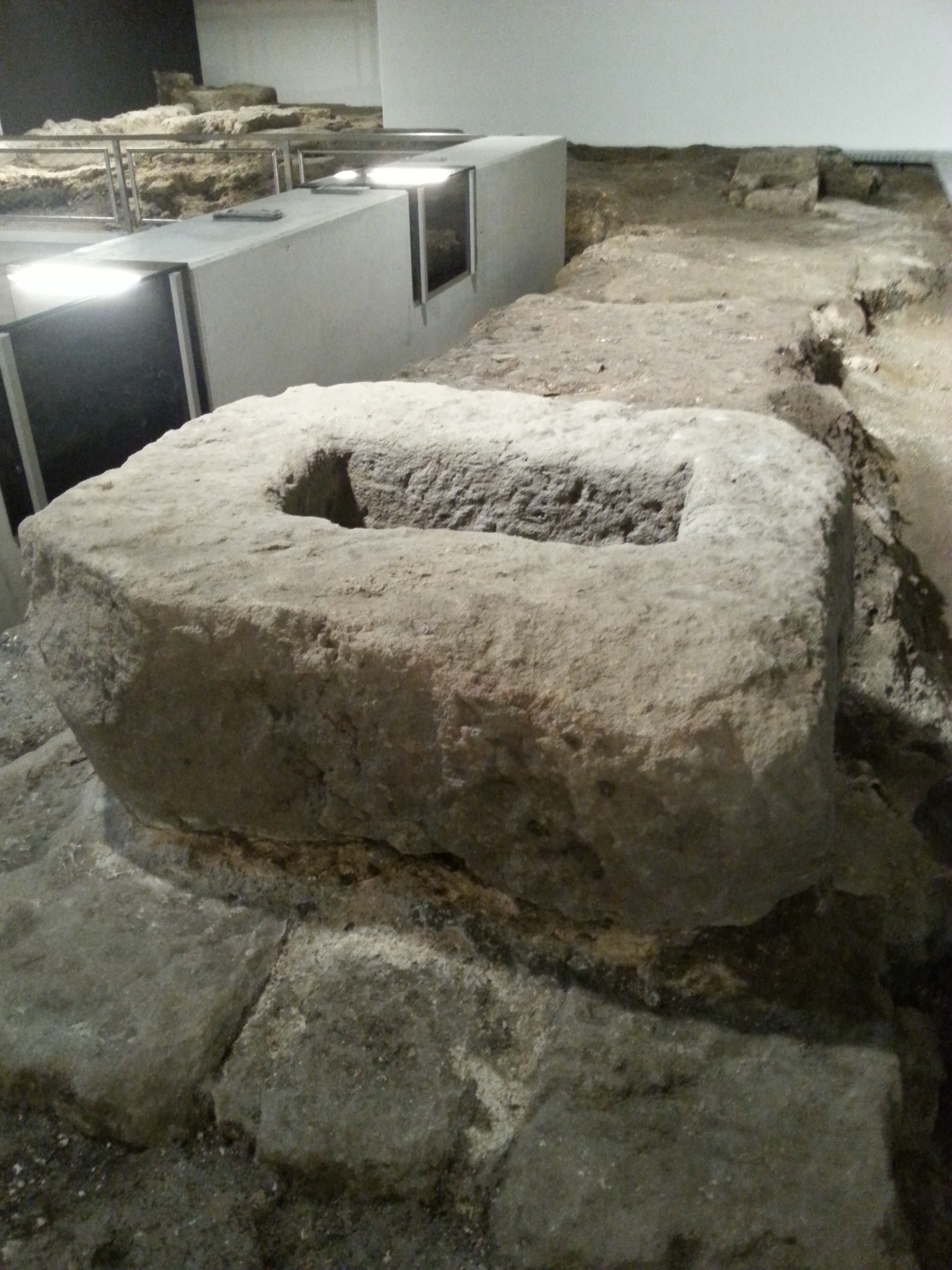 Restkastell Wallsee (A), Pfostenfundament.